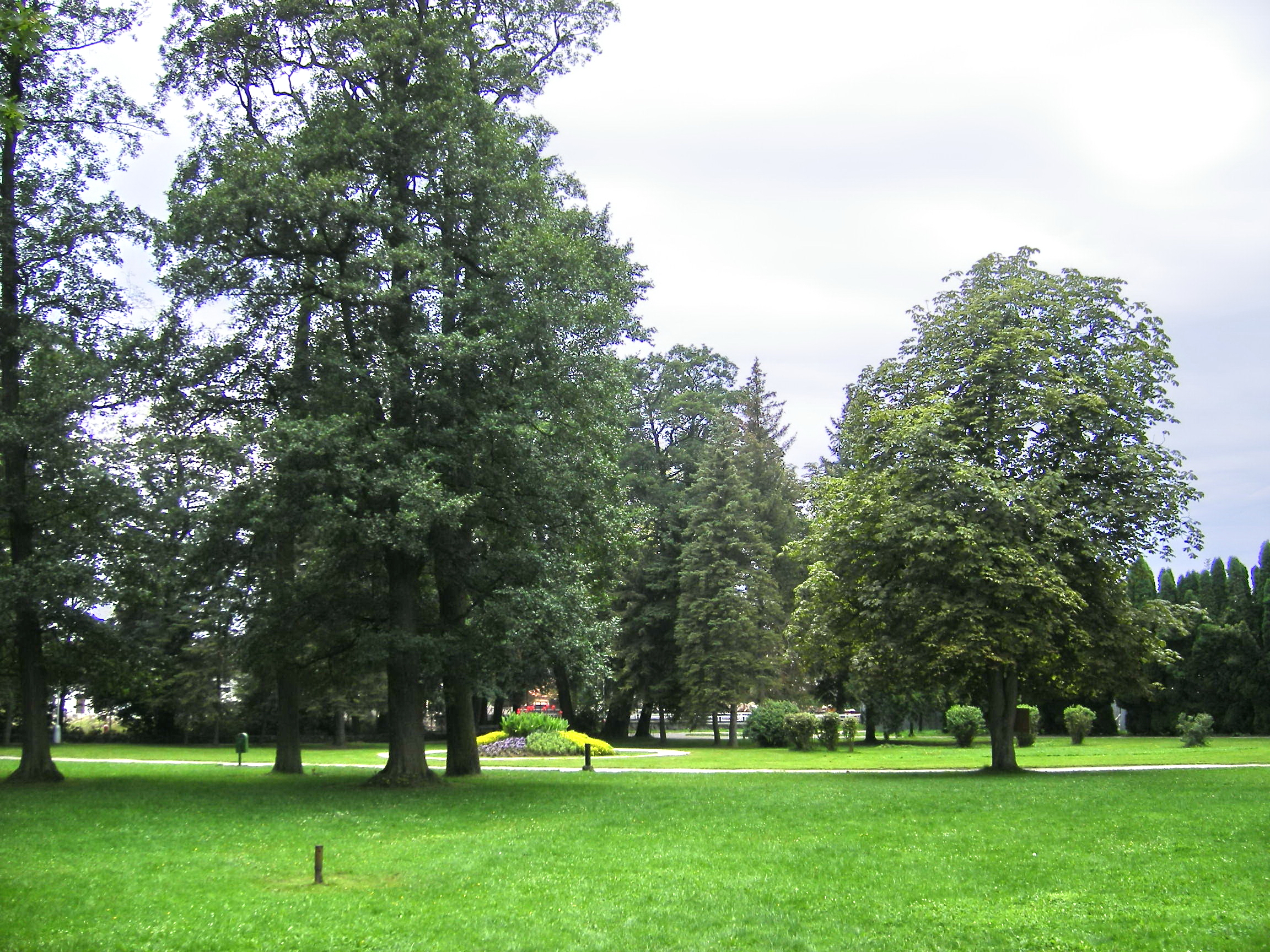 Turčianske Teplice